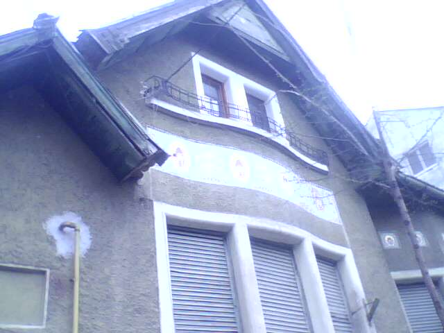 CASA în ARAD construită în 1912.